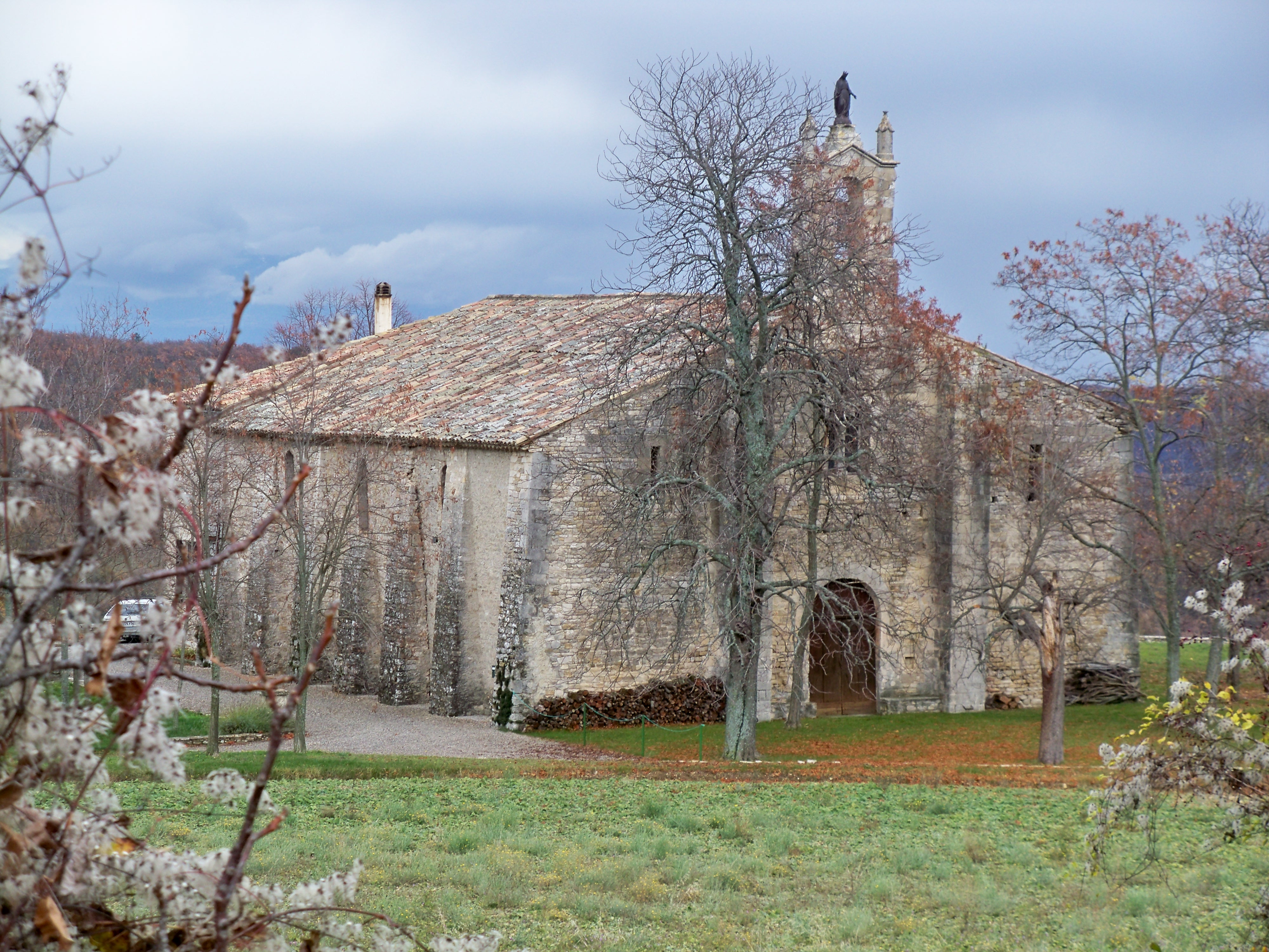 ancienne chapelle, maintenant en partie habitée, près de Vachères (04)